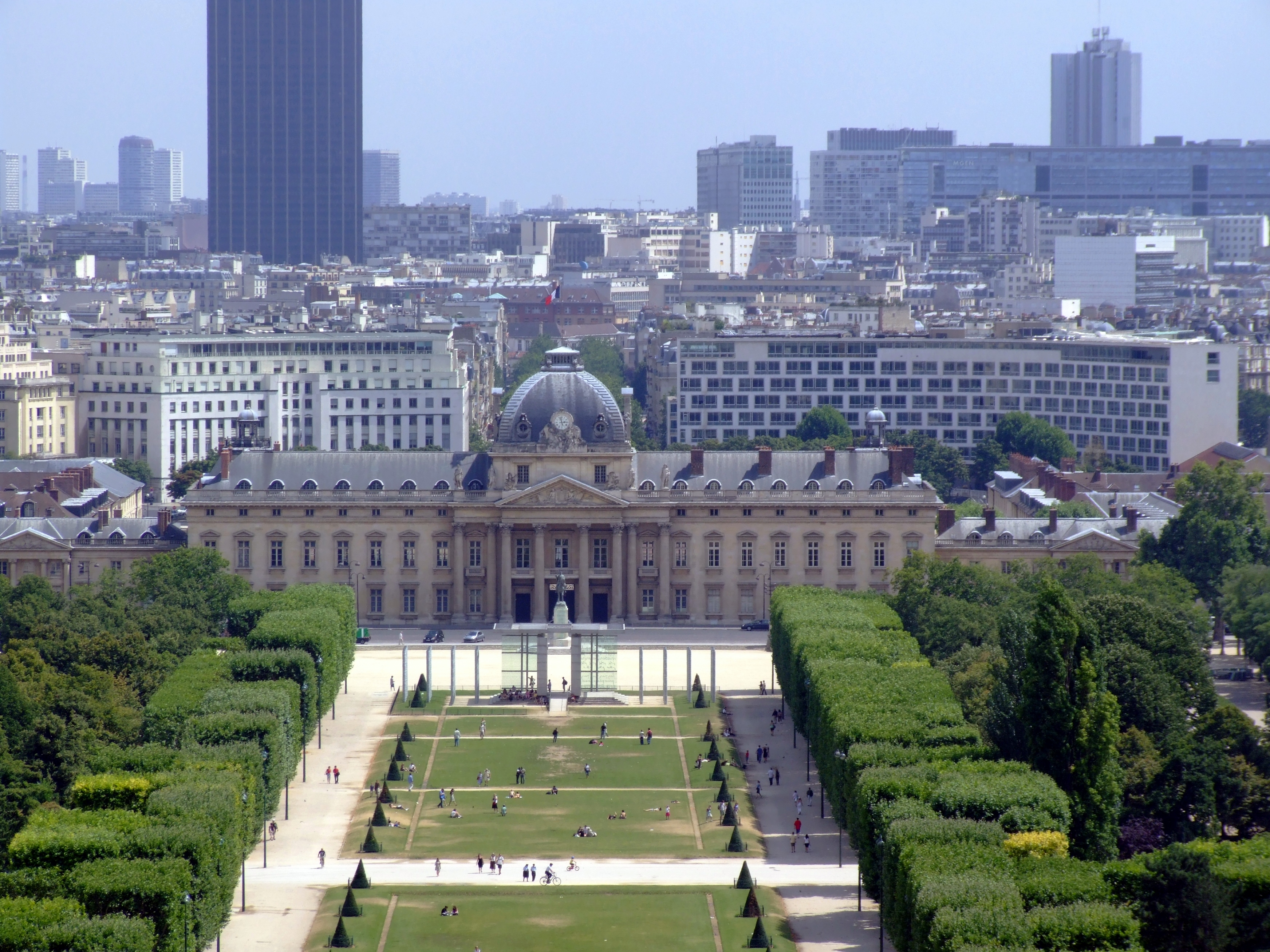 Champ de Mars de la première plateforme de la Tour Eiffel, Paris, France